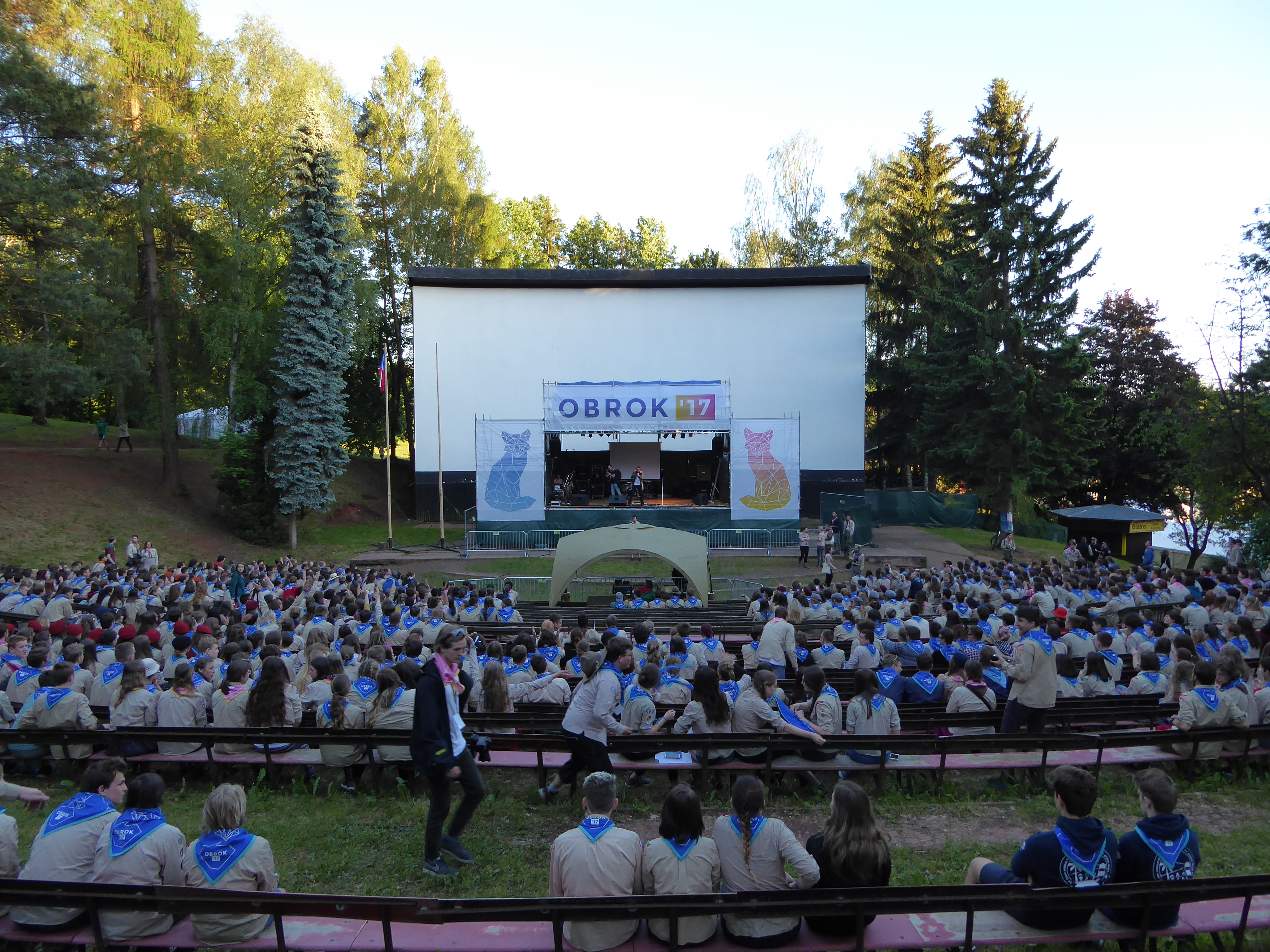 Pódium v amfiteatru na Obroku 2017.